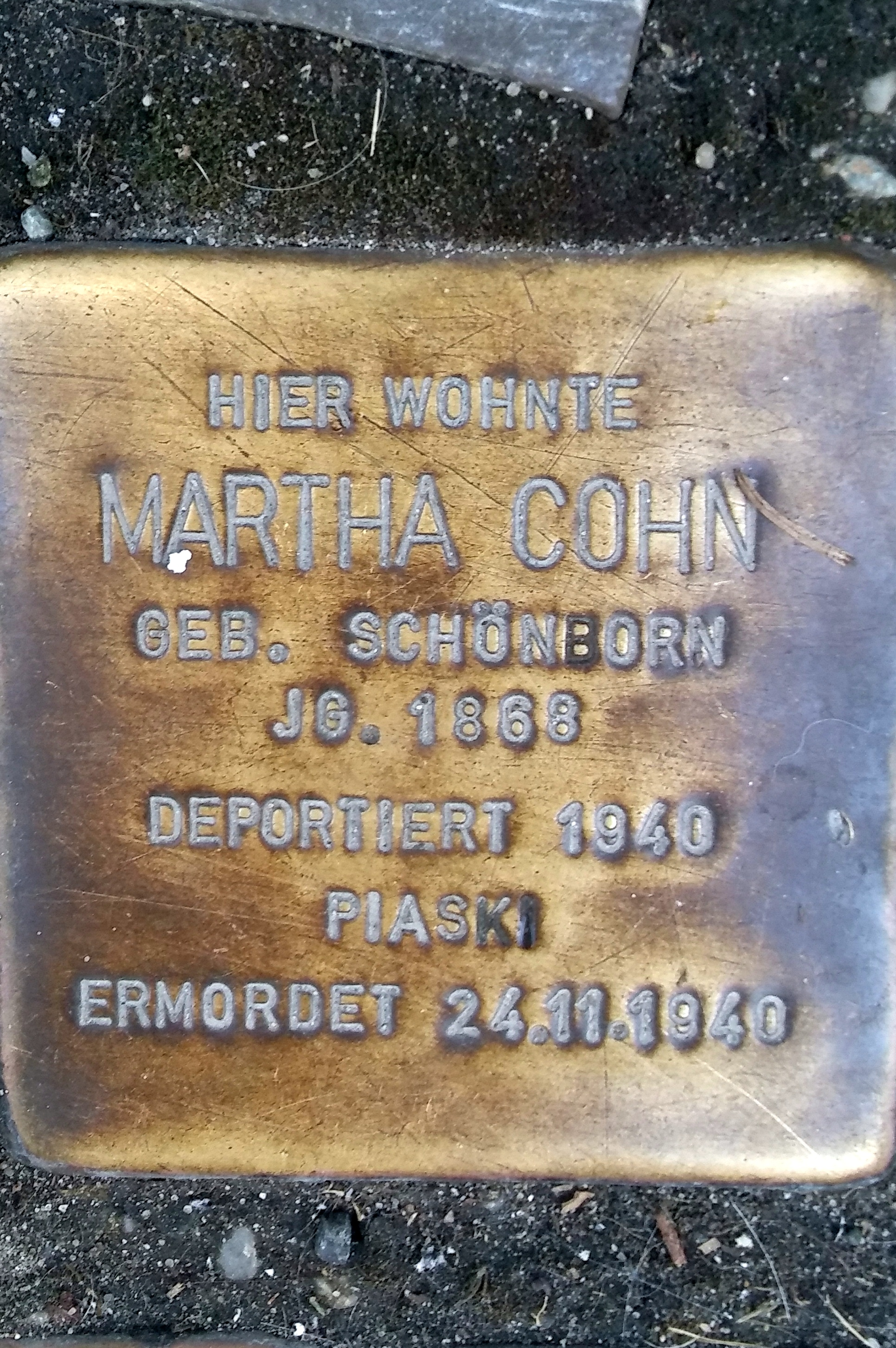 Stralsund, Mönchstraße 37, Stolperstein Martha Cohn